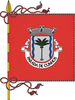 Estandarte da freguesia de Parada de Cunhos (concelho de Vila Real)